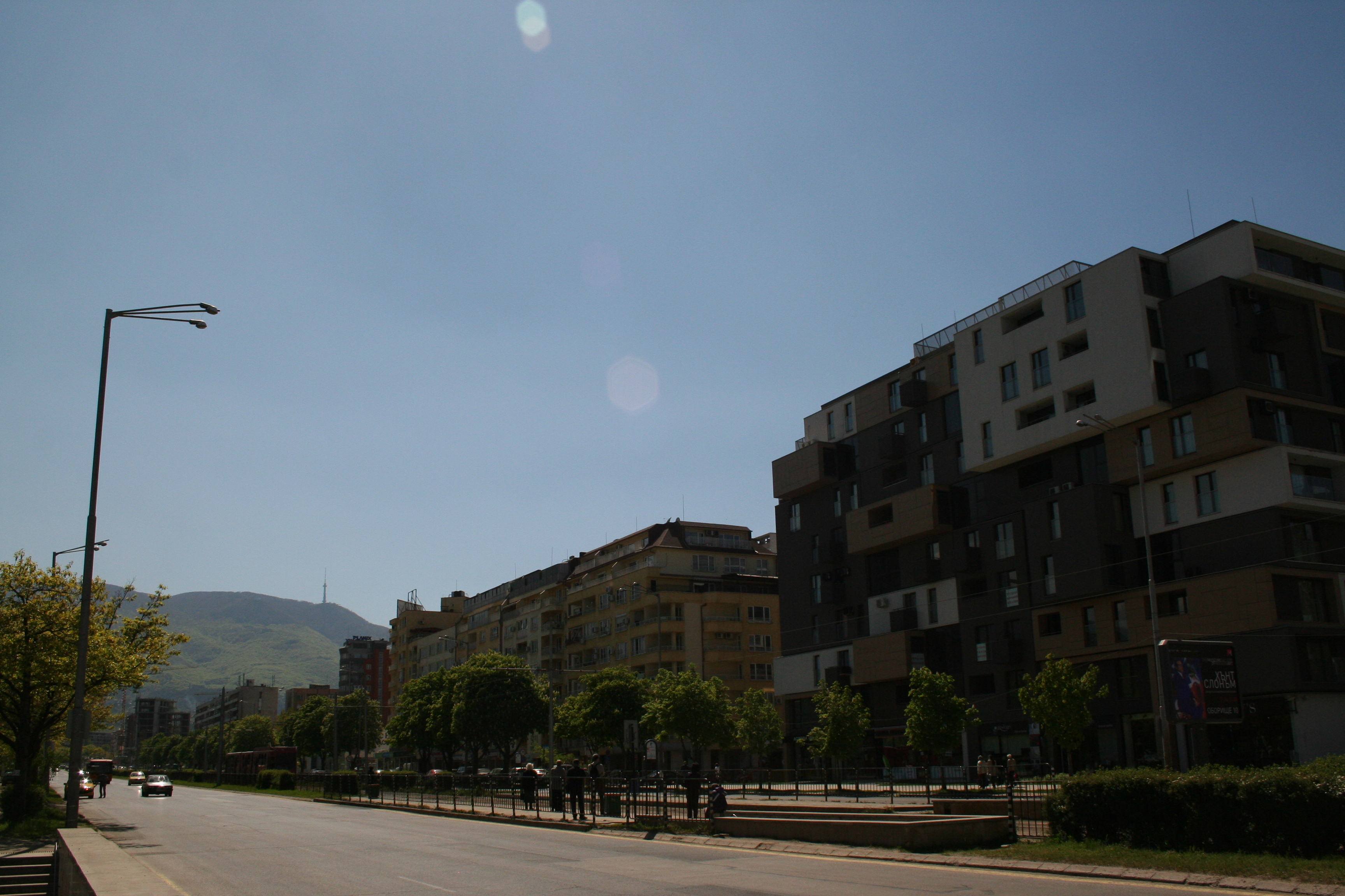 кв. „Борово“ и бул. „България“; спирка на трамвай № 7 и сграда „Жаклин“